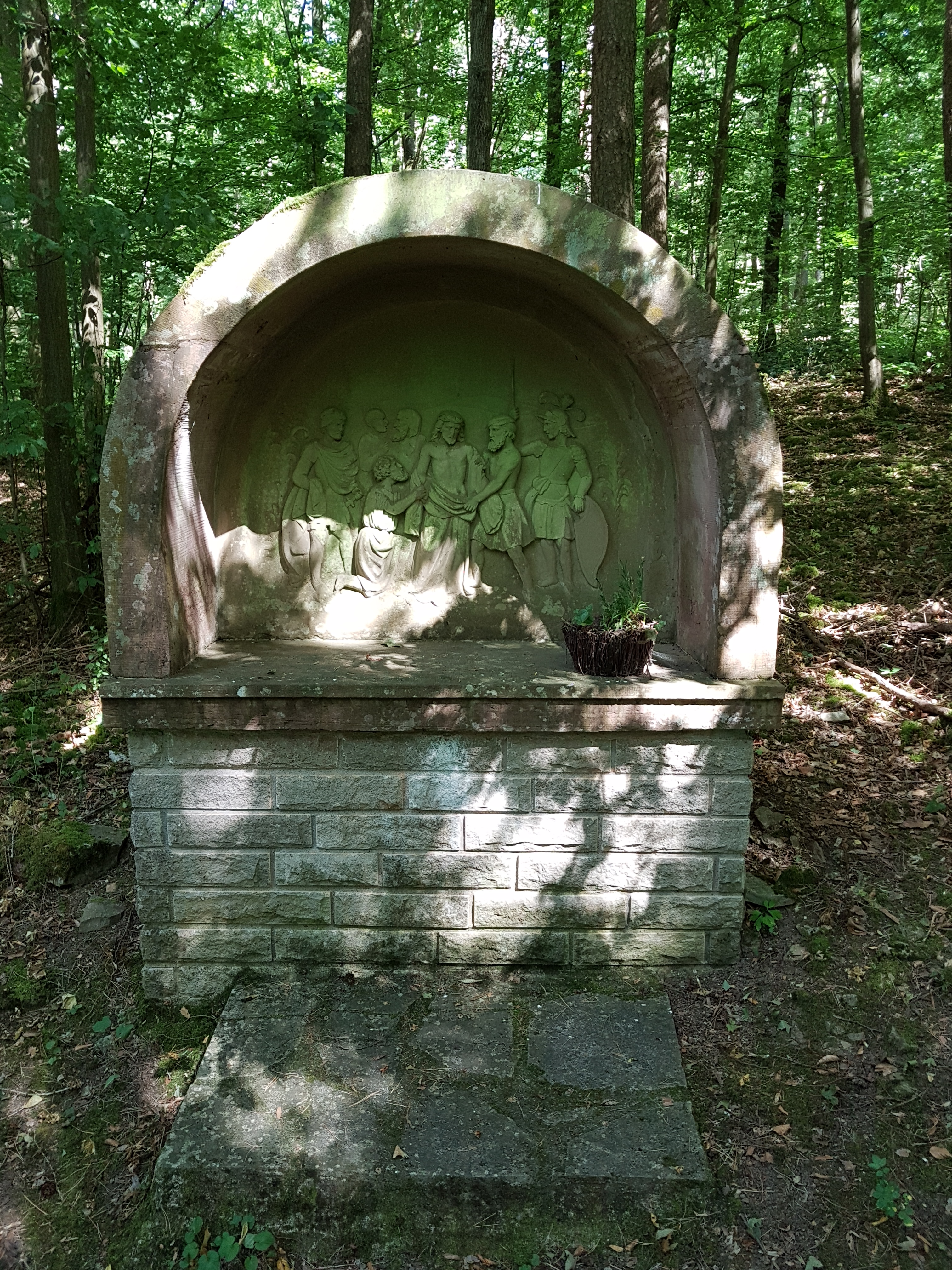 Kreuzweg zur Dittwarer Kreuzkapelle am Kreuzhölzle Bilder hochkant